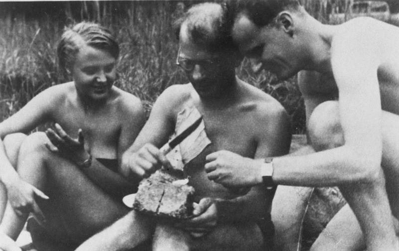 ADN-ZB/IML-ZPA Mitglieder der Widerstandsorganisation Schulze-Boysen/Harnack v.l.n.r.: Martha Husemann, Günter Weisenborn, Harro Schulze-Boysen.